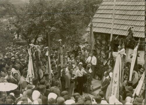 Proslava 100-letnice Levstikovega rojstva leta 1931 pred njegovo rojstno hišo